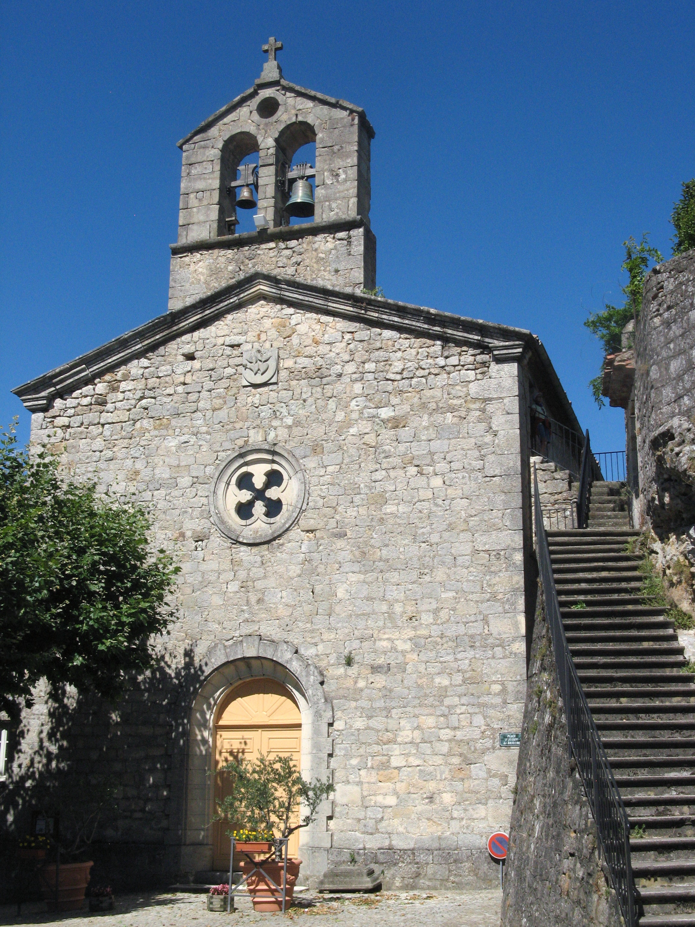 Tauriers : église Saint Julien de Brioude (19ème siècle)